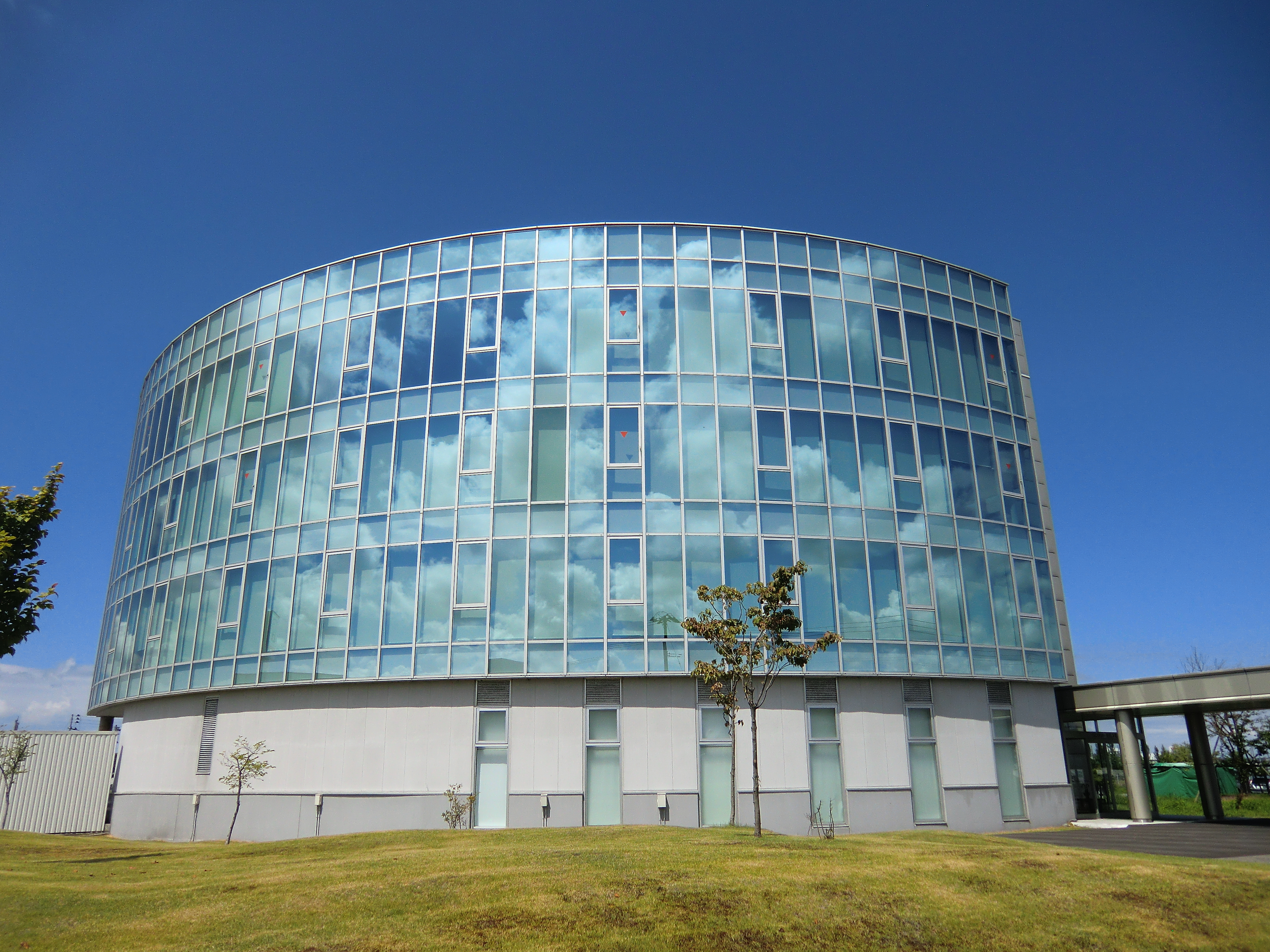 見附市にあります。